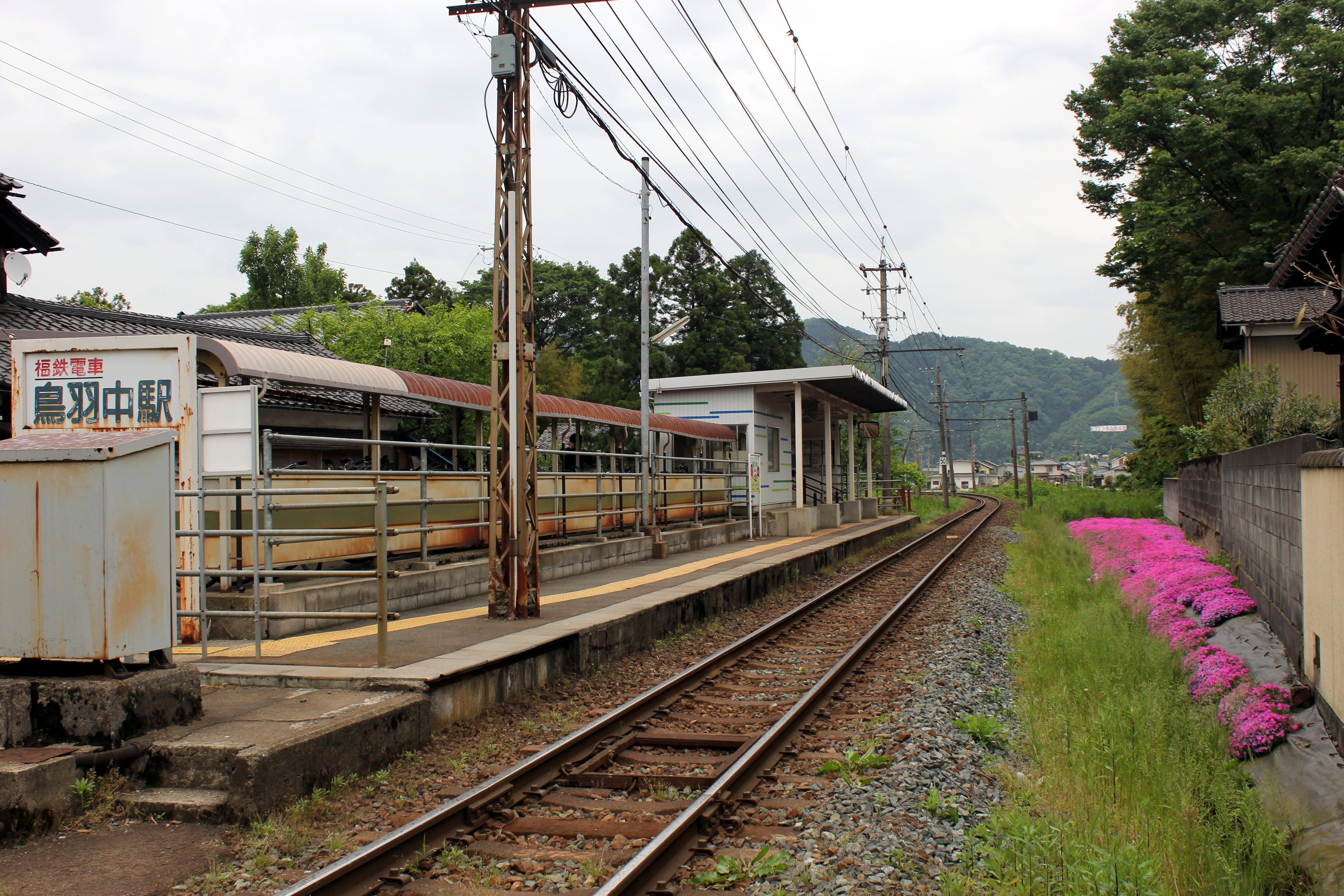 福井鉄道 鳥羽中駅全景(2013年5月19日)